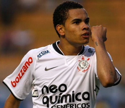 Comemoração gol de Dentinho vestindo a camisa do Corinthians em 2010.